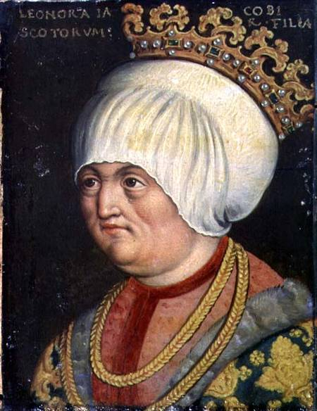 Éléonore Stuart